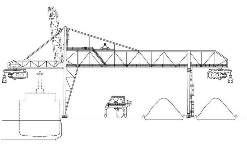 Mostowiec, most przeładunkowy – jedno z największych urządzeń dźwigowych, stosowane najczęściej w portach do przeładunku surowców masowych (rudy, węgla itp.). autor:Wojciech Ciszewski 02-2005 na podst. art. i notatek z okresu studiów